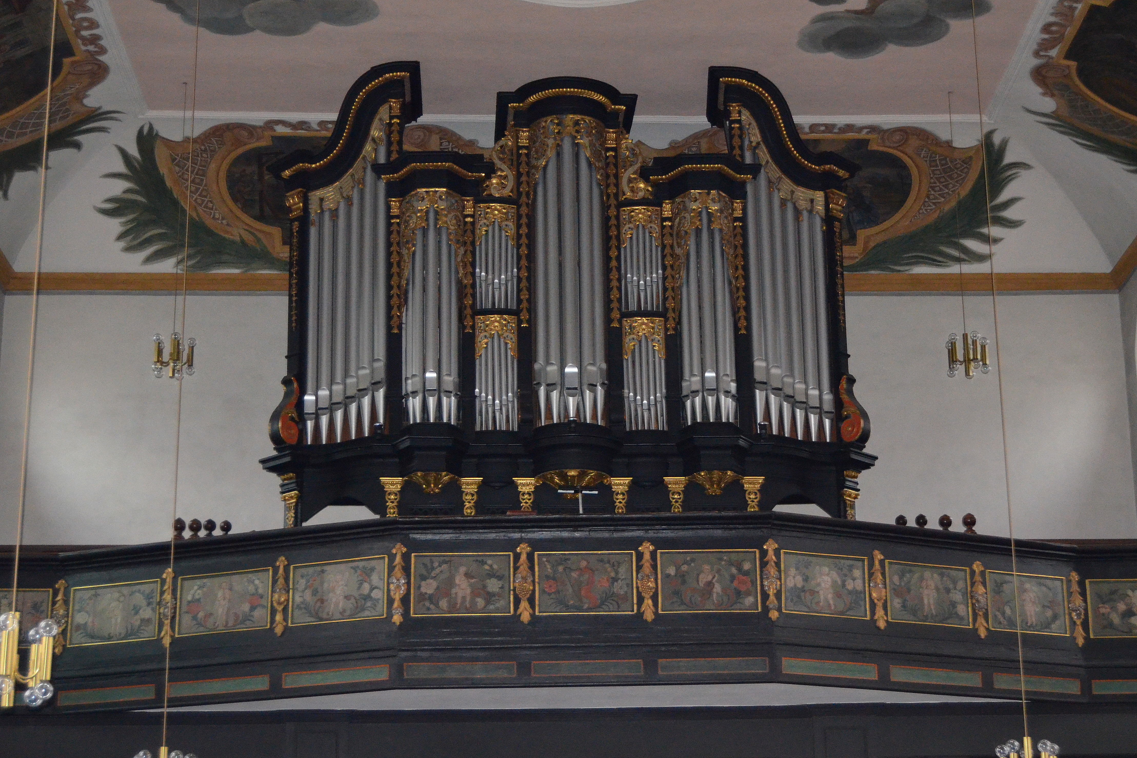 Orgel